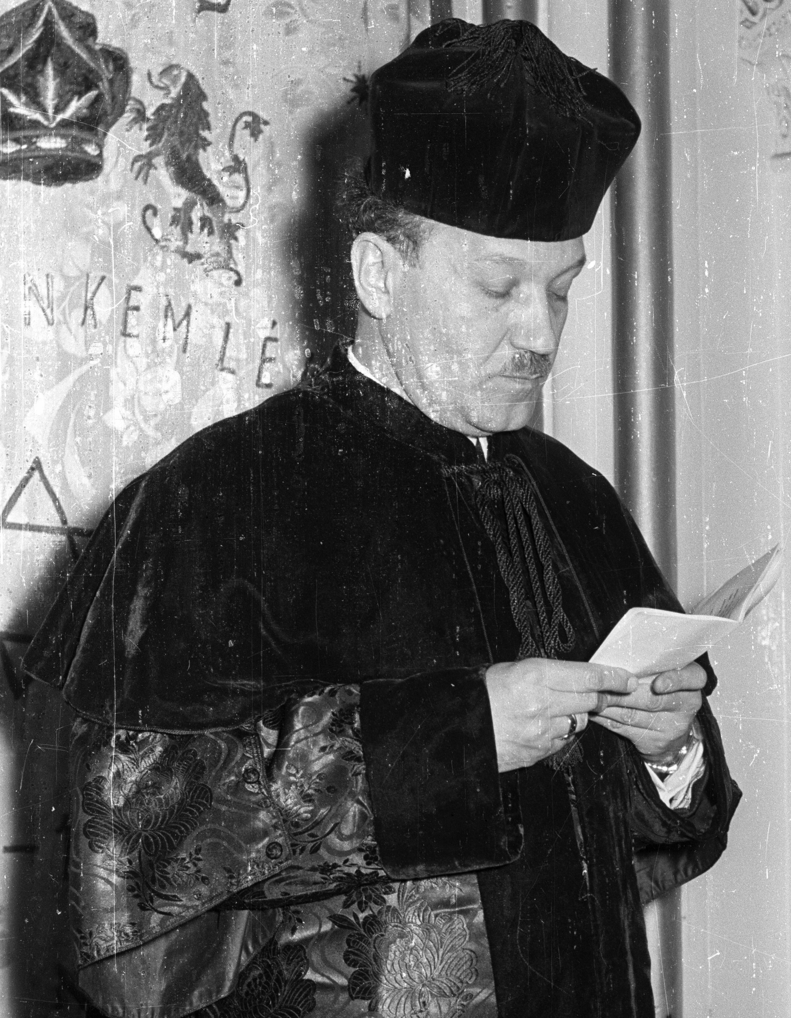 Országos Rabbiképző Intézet zsinagógája, Dr. Scheiber Sándor igazgató.